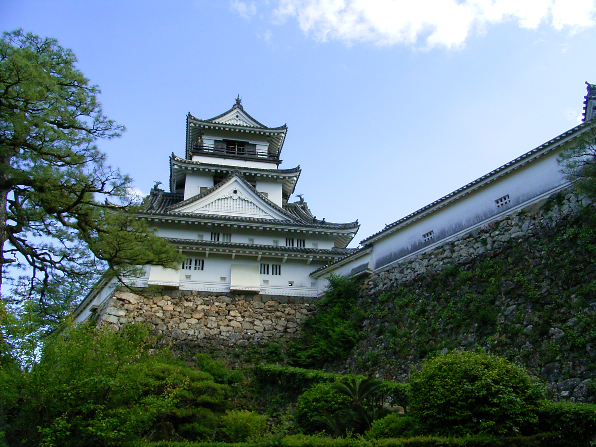 Kochi_Castle(高知城)